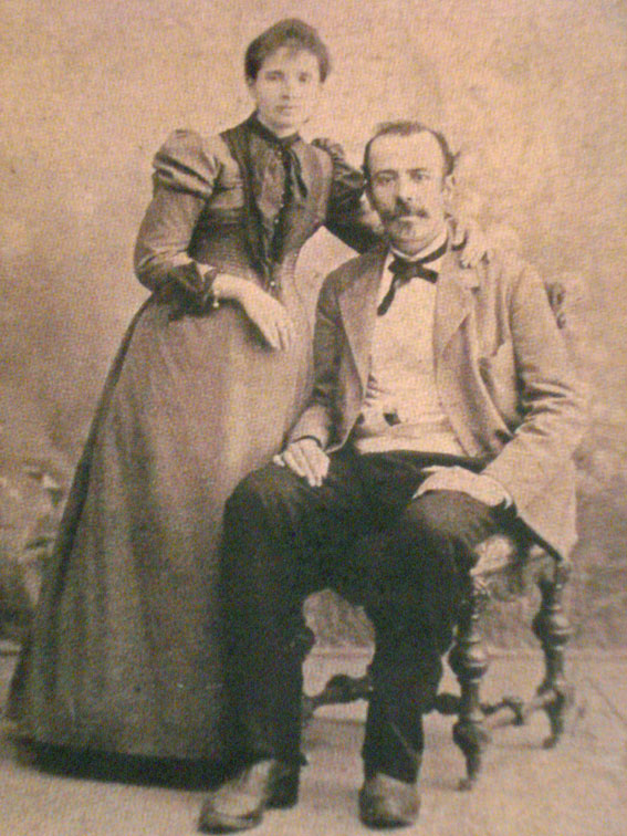 Antonio Machado Álvarez y su esposa Ana Ruiz